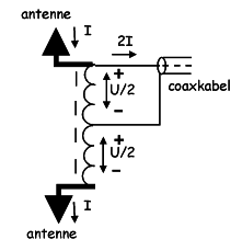 Trafo als aanpassing van symmetrische antenne aan asymmetrische antenne leiding